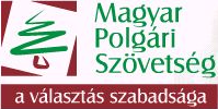 Logo PCM